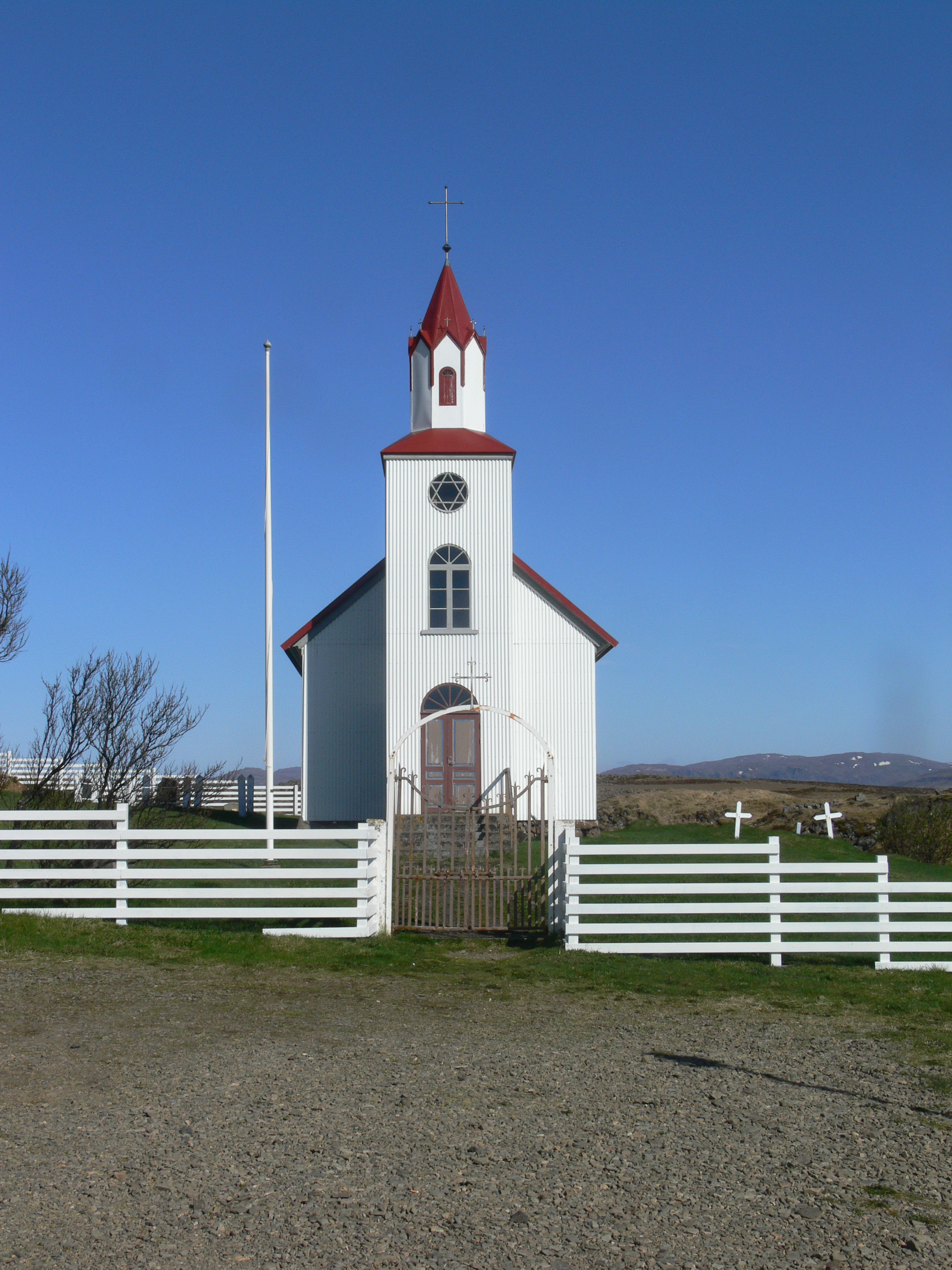 Helgafell bei Stykkishólmur. Hier lebte und starb Guðrún, eine der Hauptpersonen der Laxdæla saga. Sie ist auf dem Friedhof der Kirche begraben.